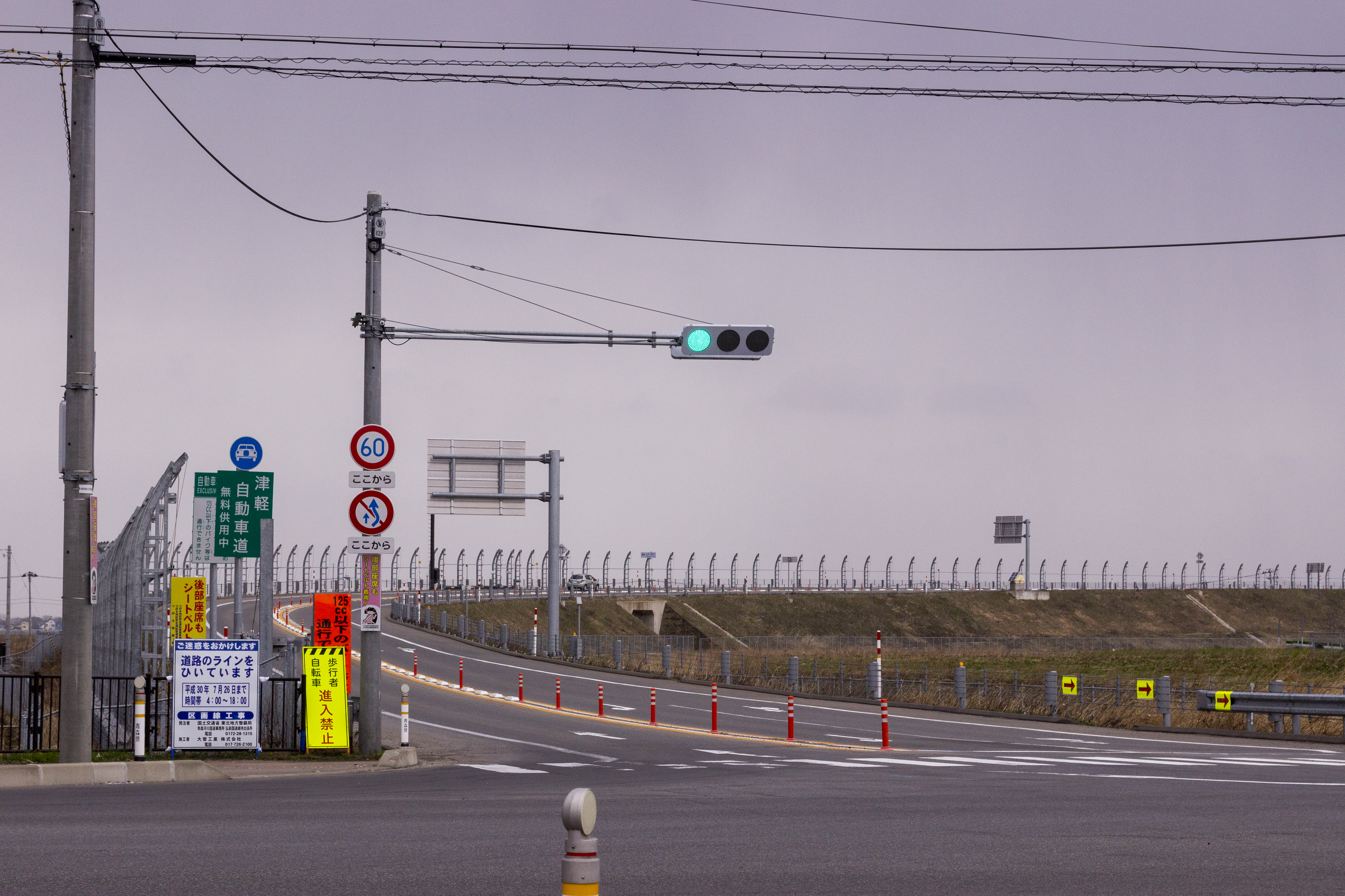 津軽自動車道 - つがる柏IC入口交差点